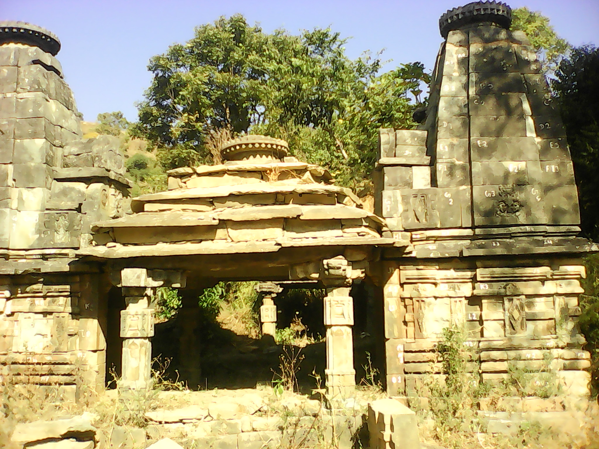 नेपाली: Ajayamerukot Raja Ajayapal Dadeldhura